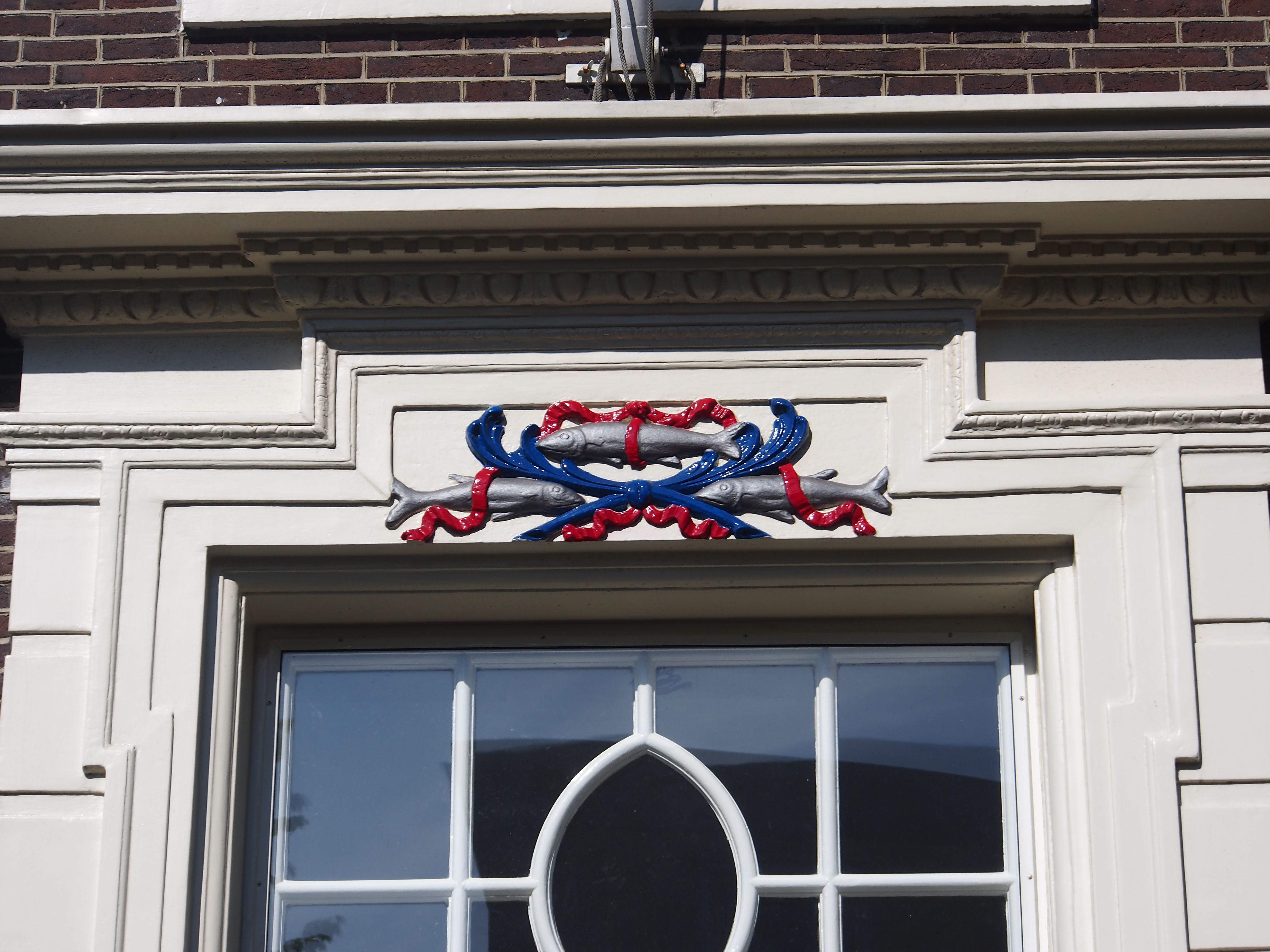 Photographed in Amsterdam, The Netherlands. Naamgever Drieharingenbrug